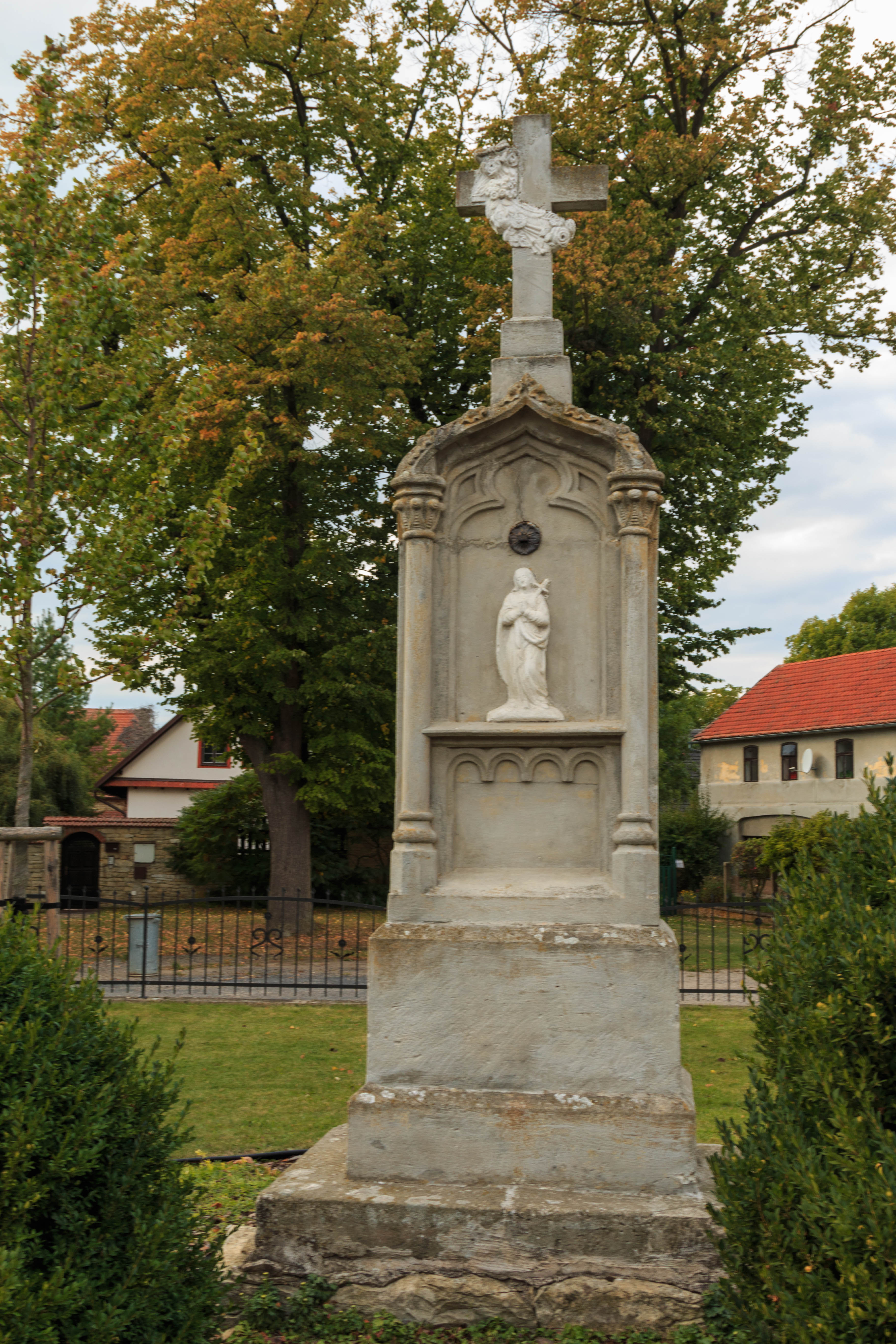 Štenec křížek